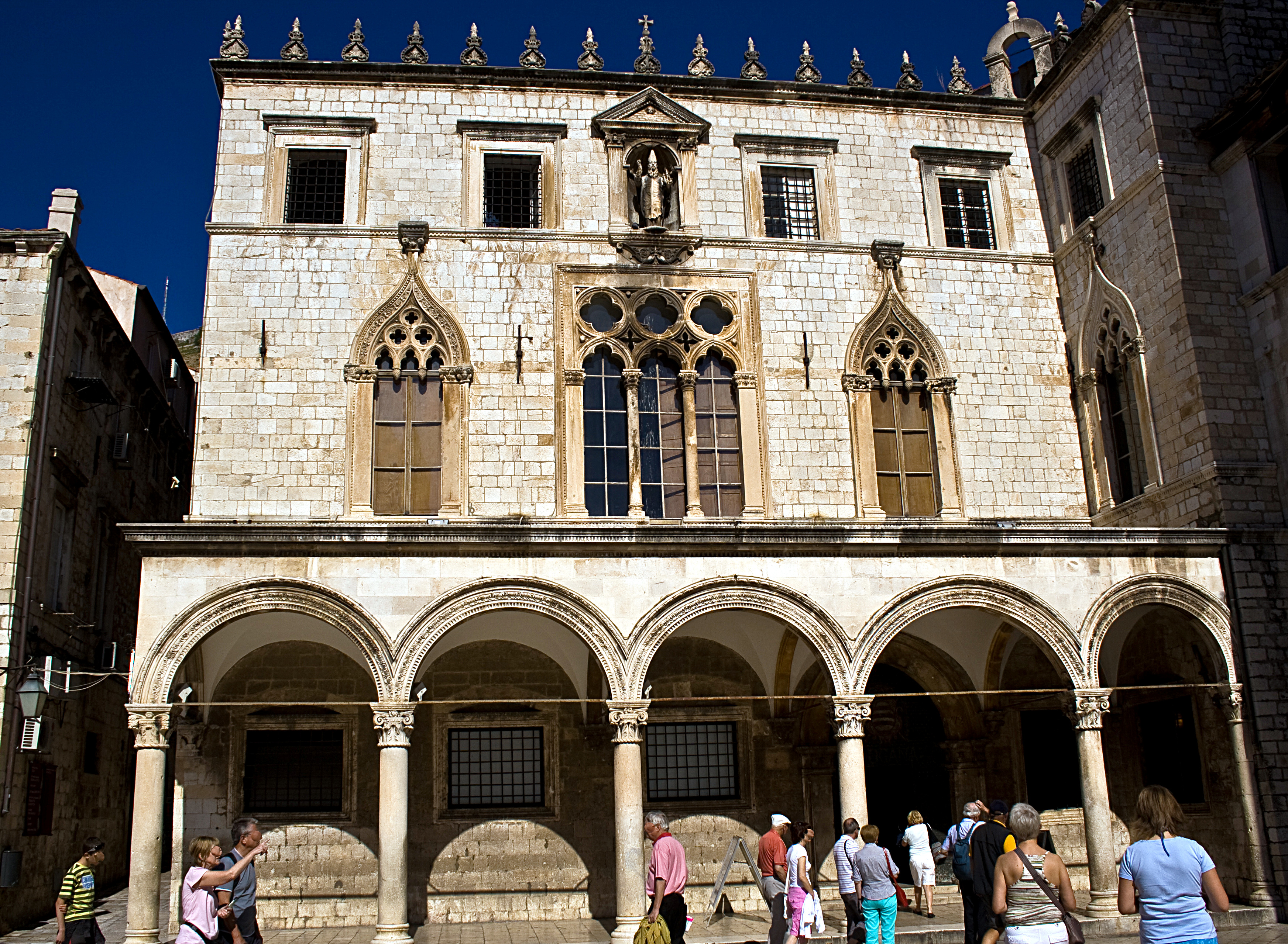 Dubrovnik, Sponza's_palace